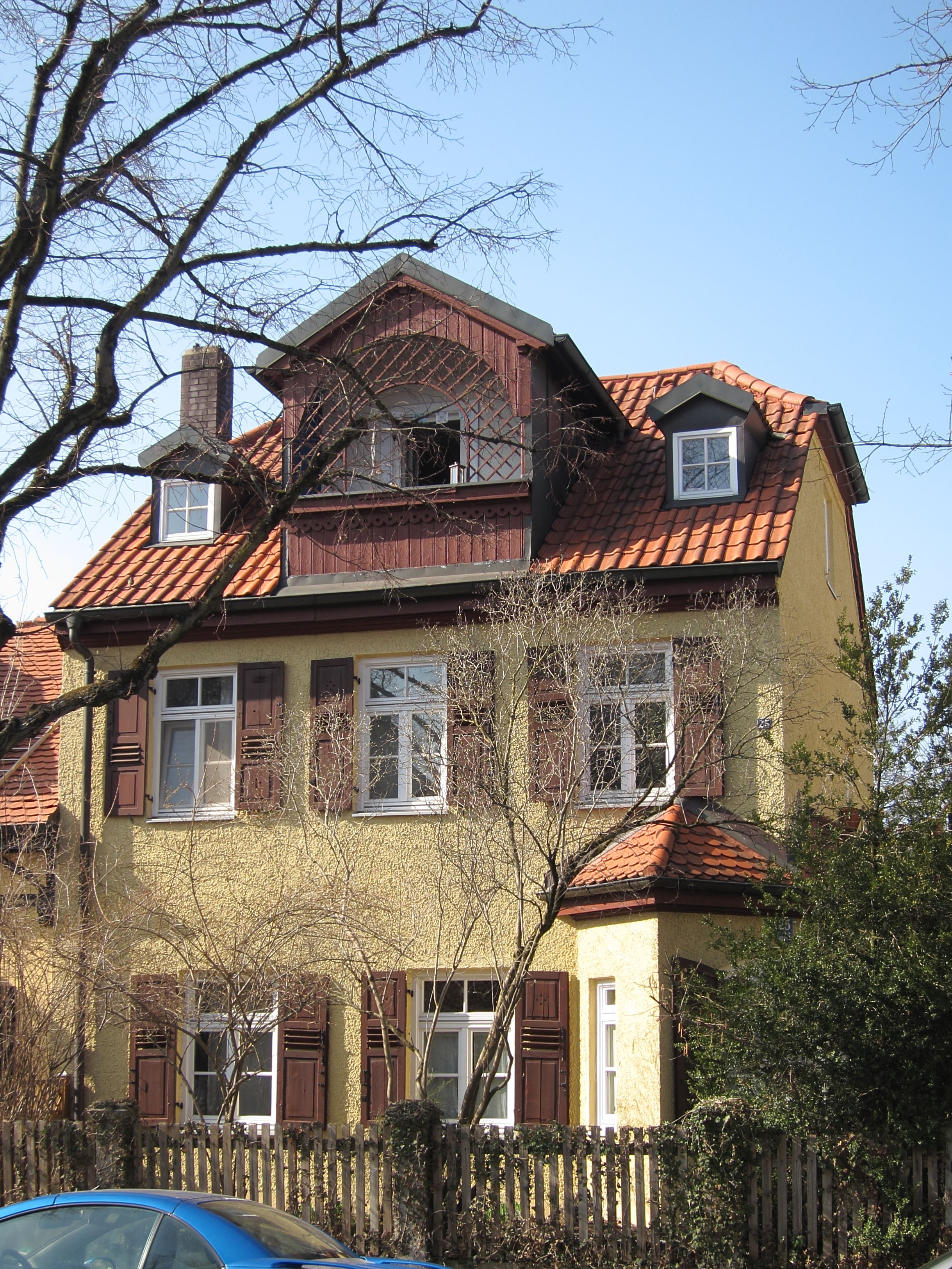 August-Exter-Straße 25; Malerische Kleinvilla, um 1895 aus dem Büro August Exter.